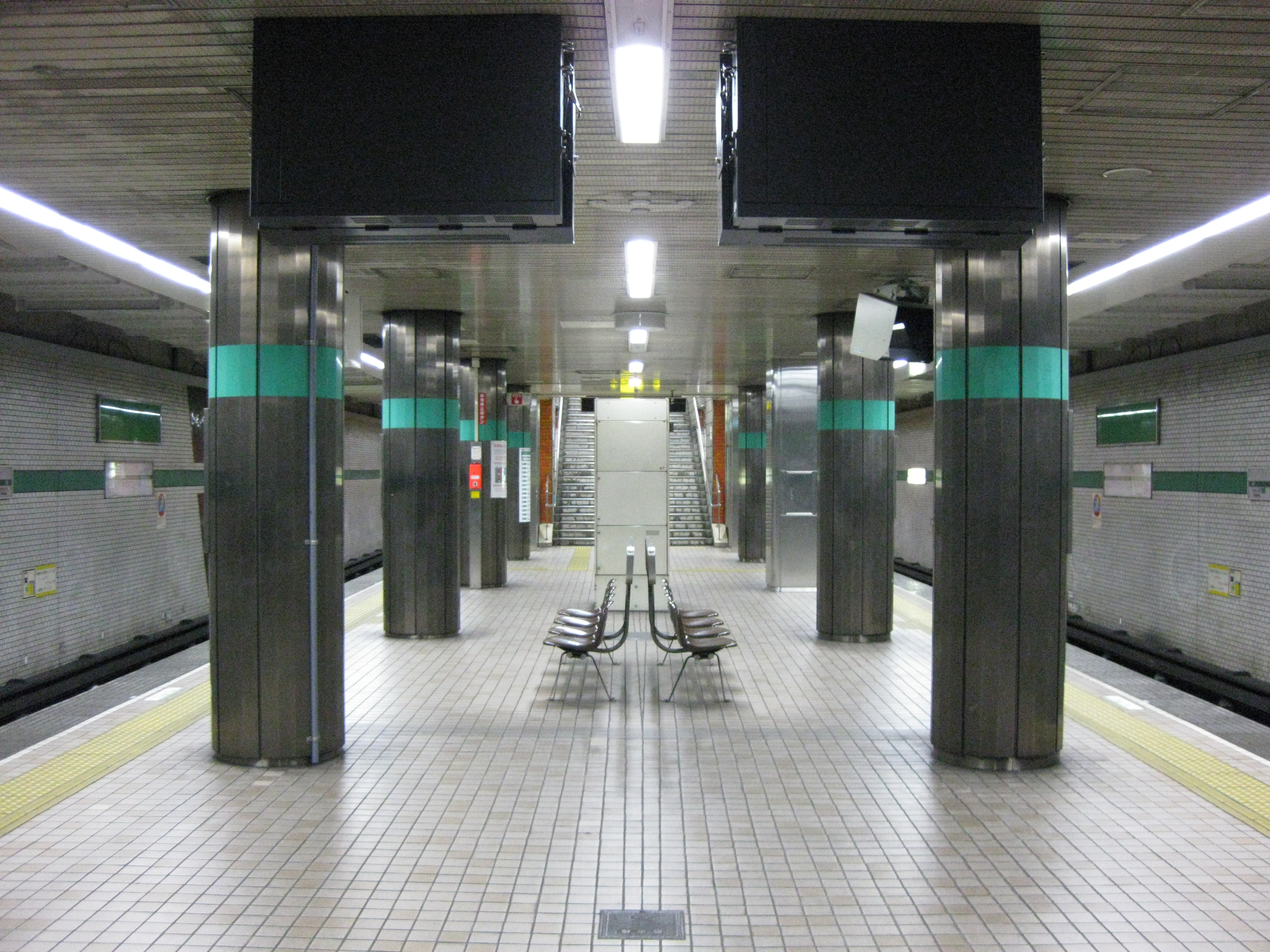 大阪市営地下鉄長田駅プラットホーム